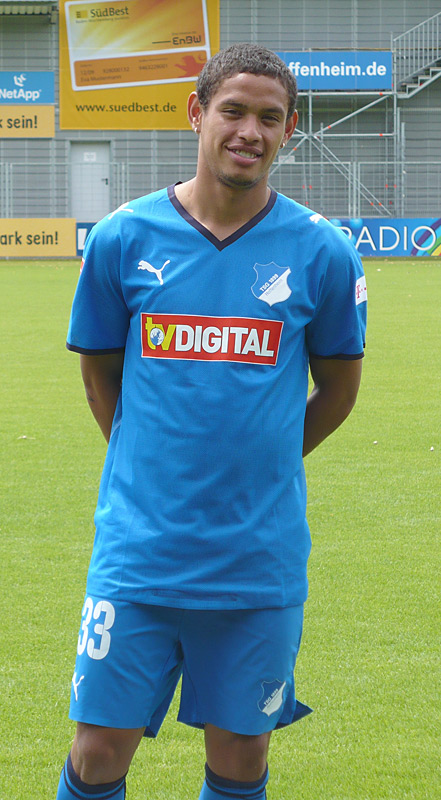 Carlos Eduardo beim Fototermin zur Saison 08/09. Foto wurde von mir aufgenommen.